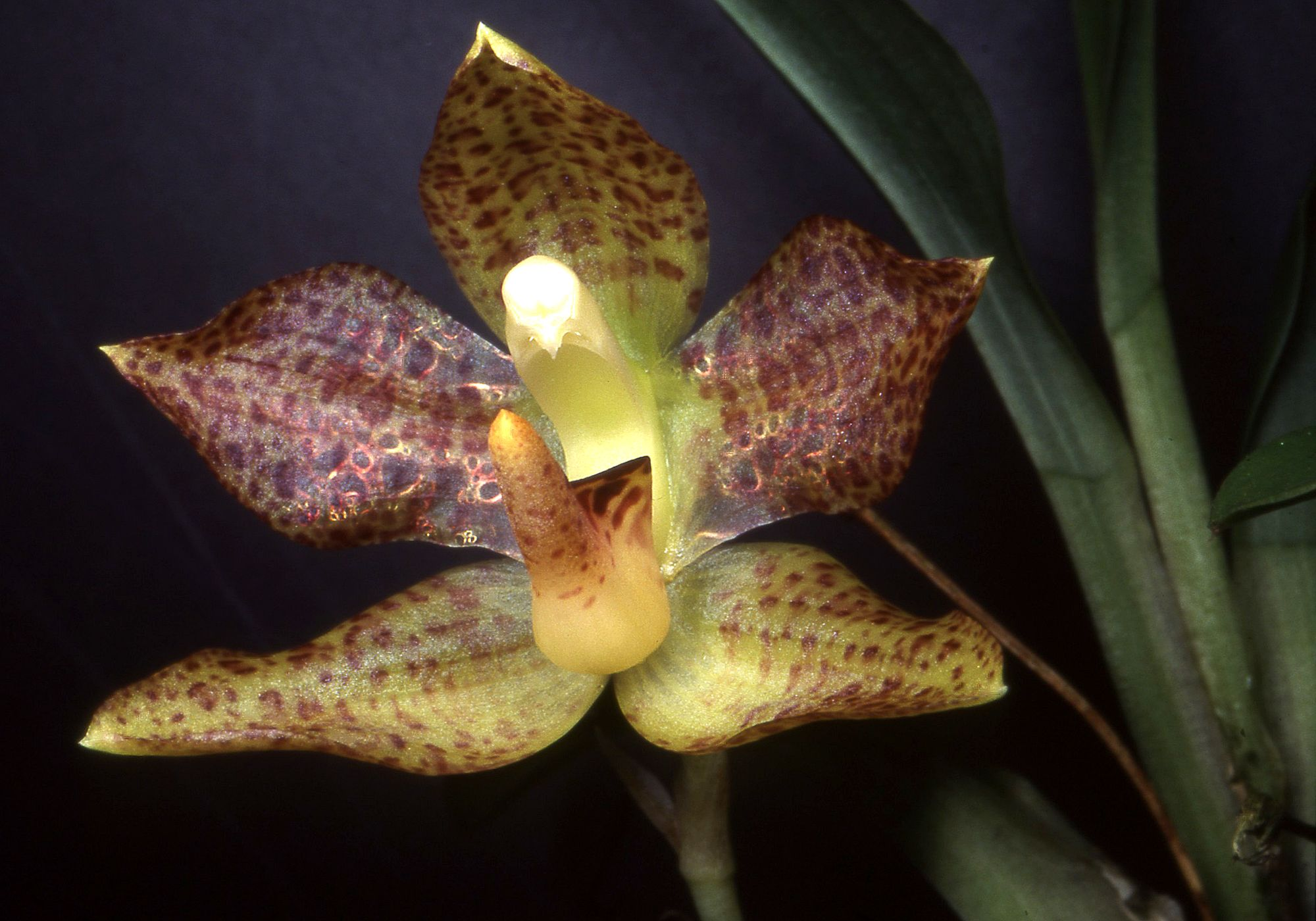 Stenia guttata